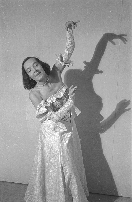 Original image description from the Deutsche FotothekAufnahmen von M. Friedrichs, M. Fischer, Hermann Matern, Arno Schellenberg und Frau, Frau Gret Palucca, Erich Ponto, Prof. Joseph Keilberth, Otto Falvay